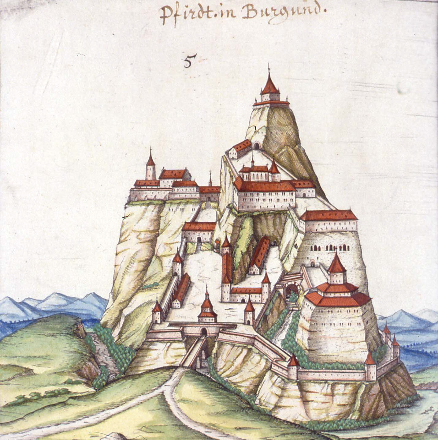 Skizze der Burg Ferrette (auf